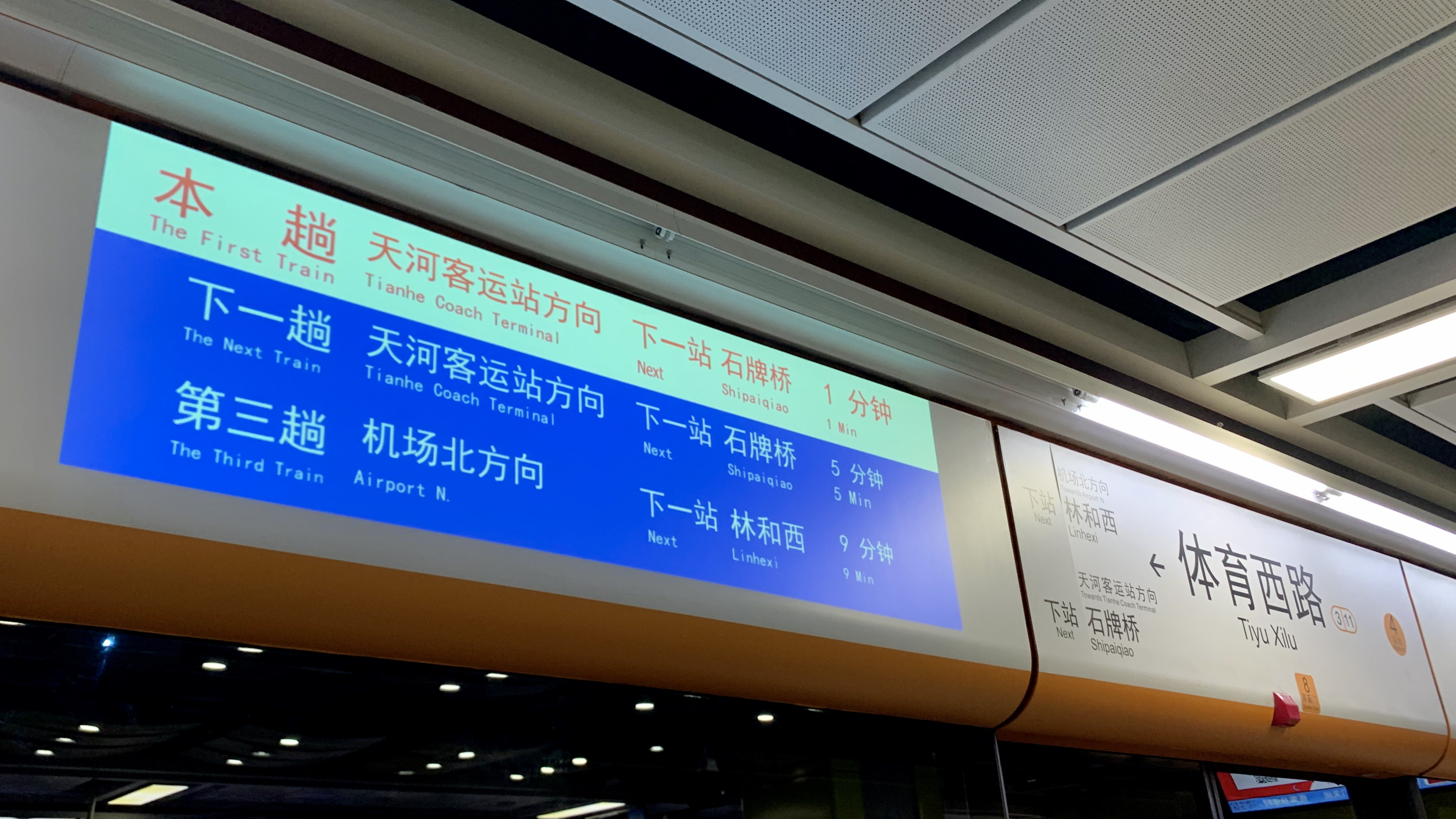 广州地铁3号线体育西路站4号站台导向指示牌